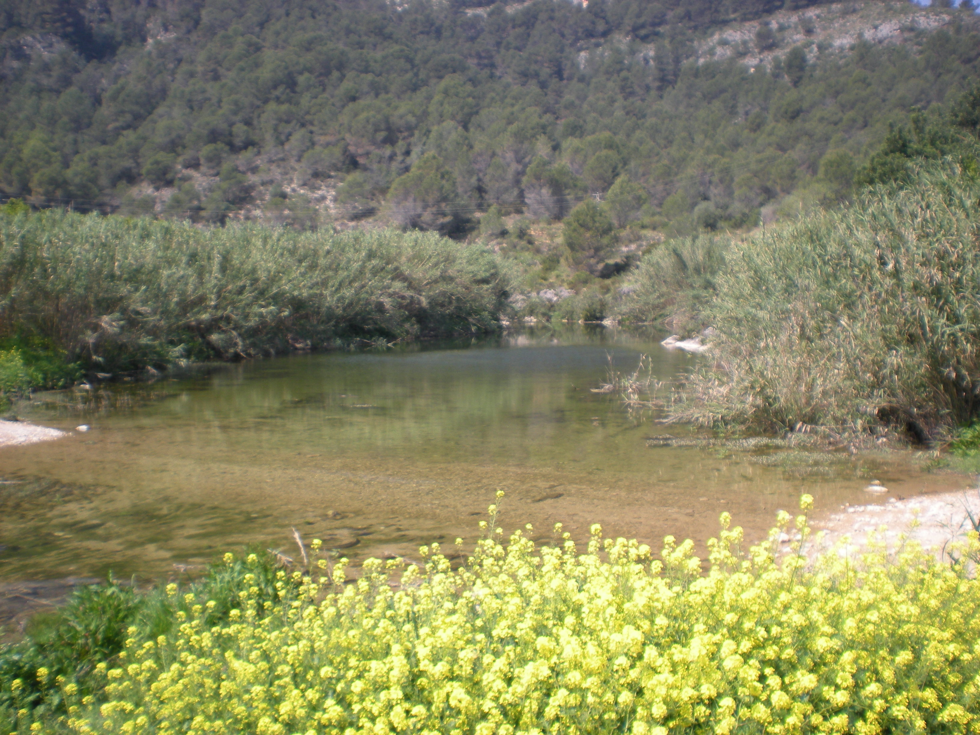 Riu Vernissa (Ròtova)